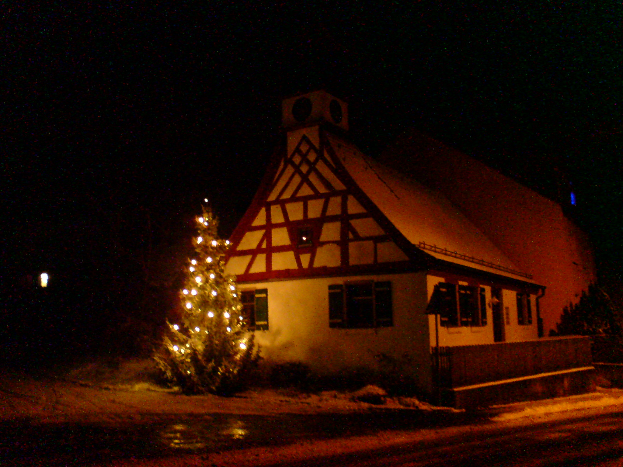 ehemaliges Hirtenhaus mit Uhrentürmchen, Großschwarzenlohe